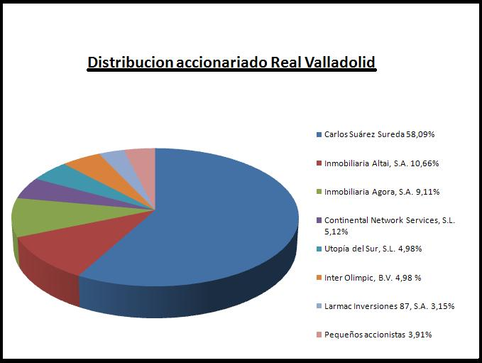 Distribucion del accionariado del Real Valladolid Club de Fútbol